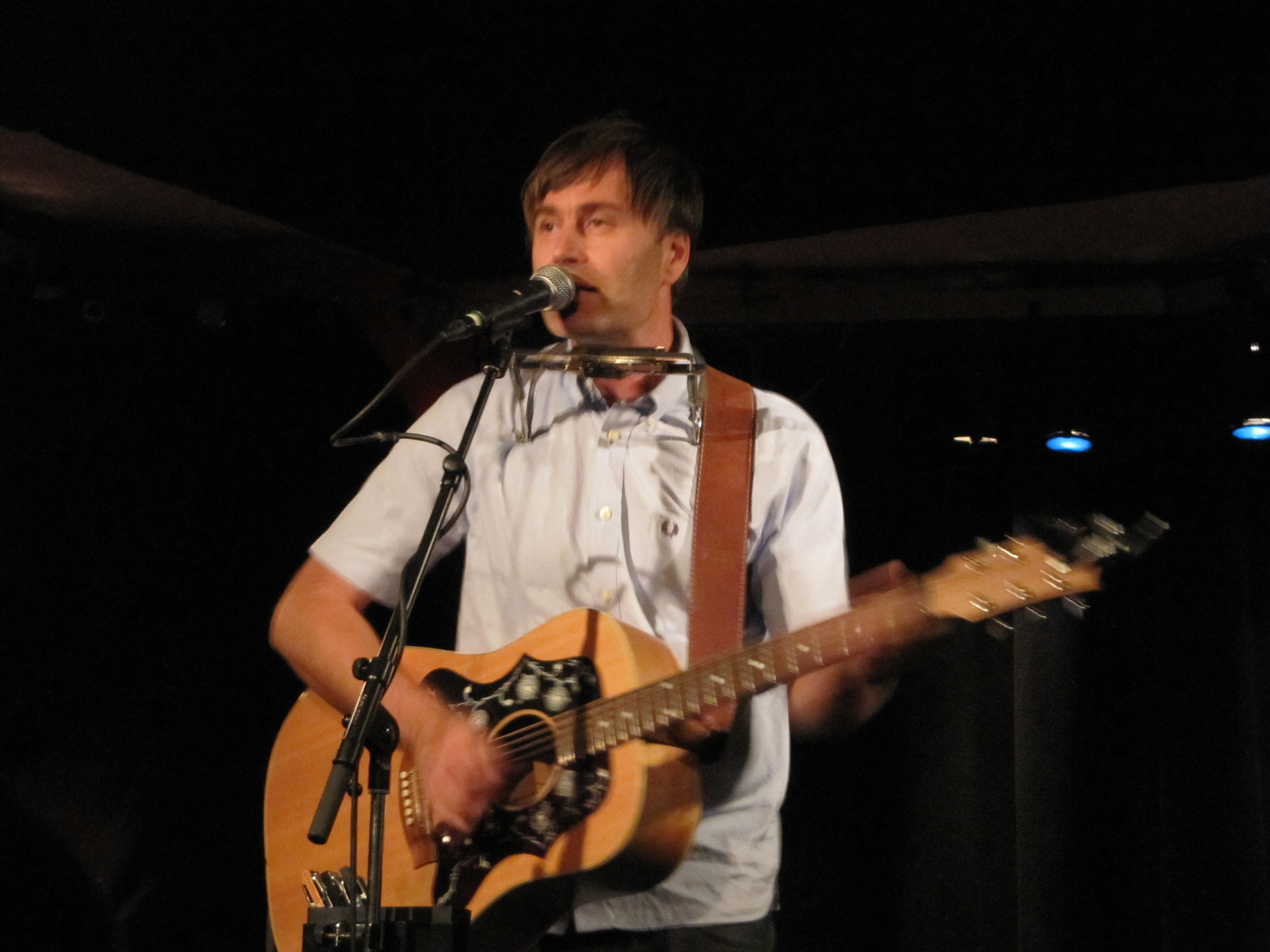 Dirk Darmstaedter - Munster (sept 2010)